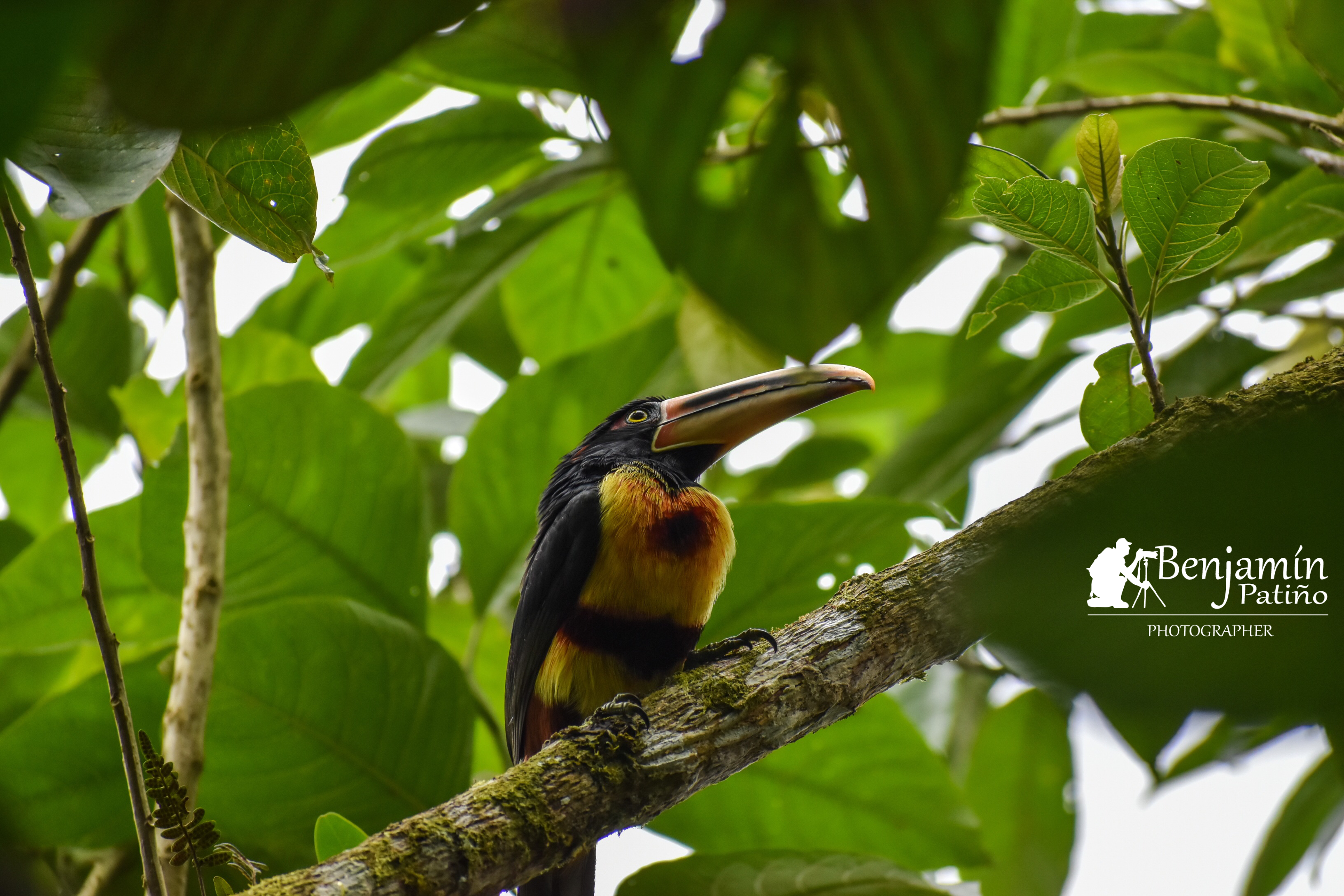 MINDO-ECUADOR